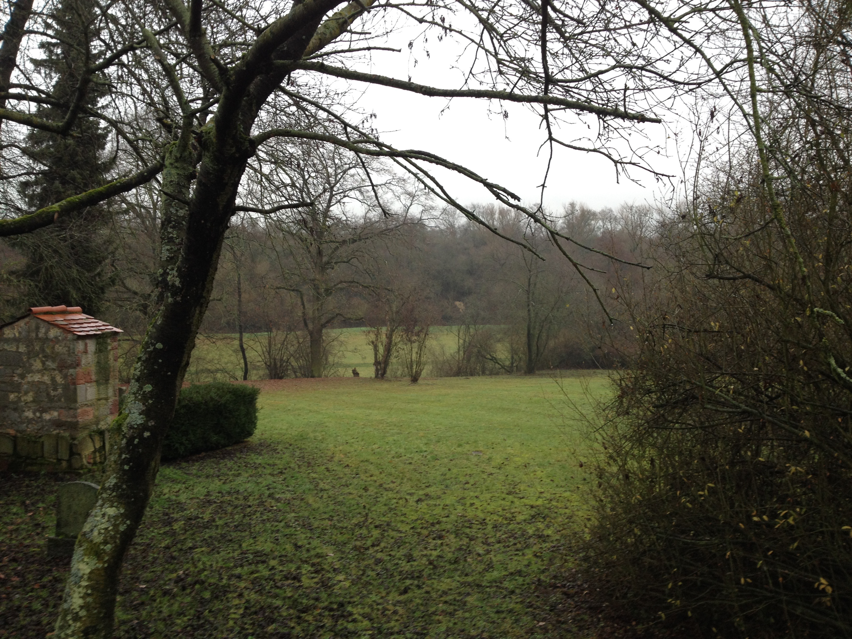 Ansicht des Gräberfeldes des jüdischen Friedhofs Flörsheim am Main